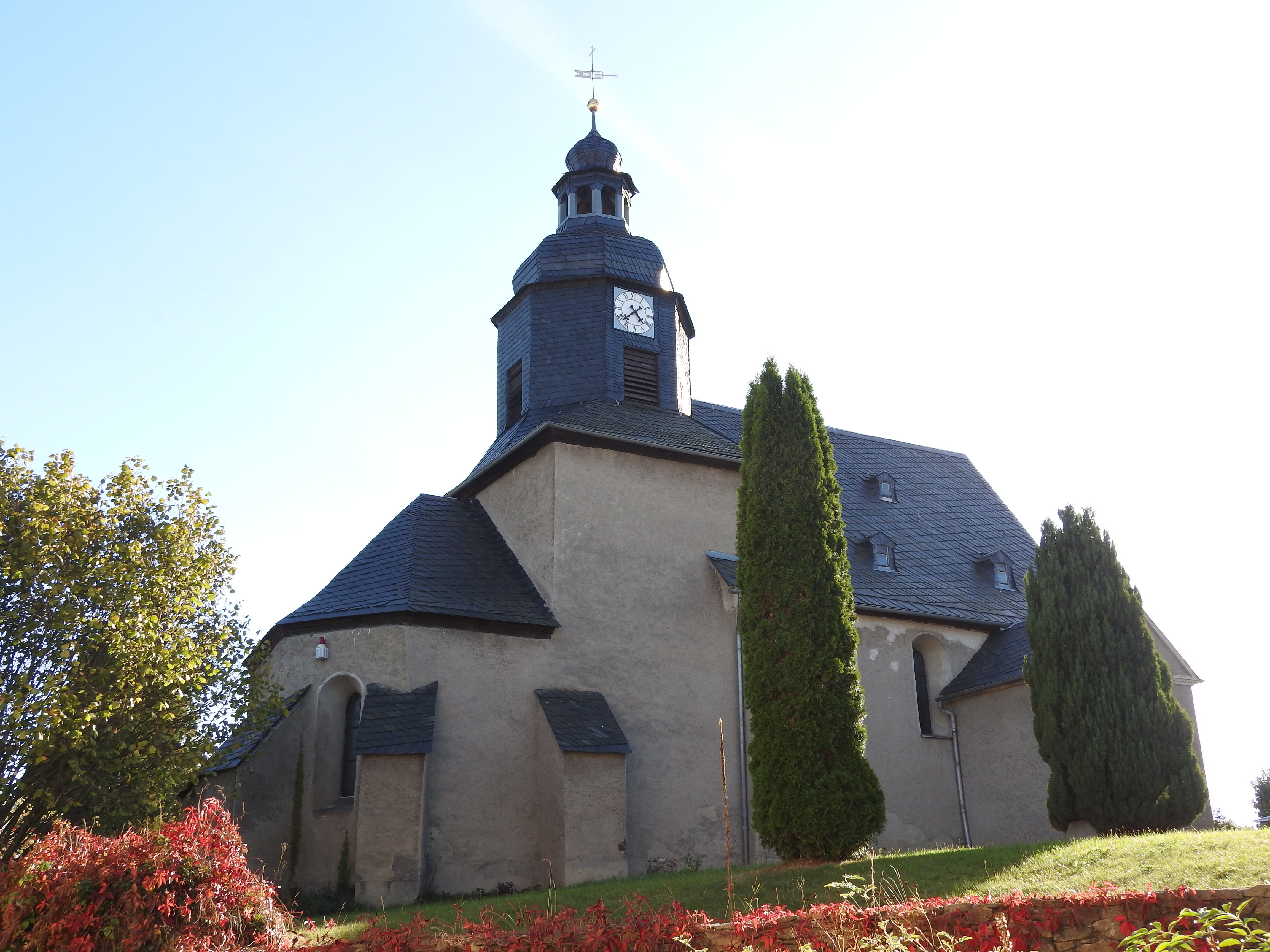 Kirche in Dobia, Thüringen